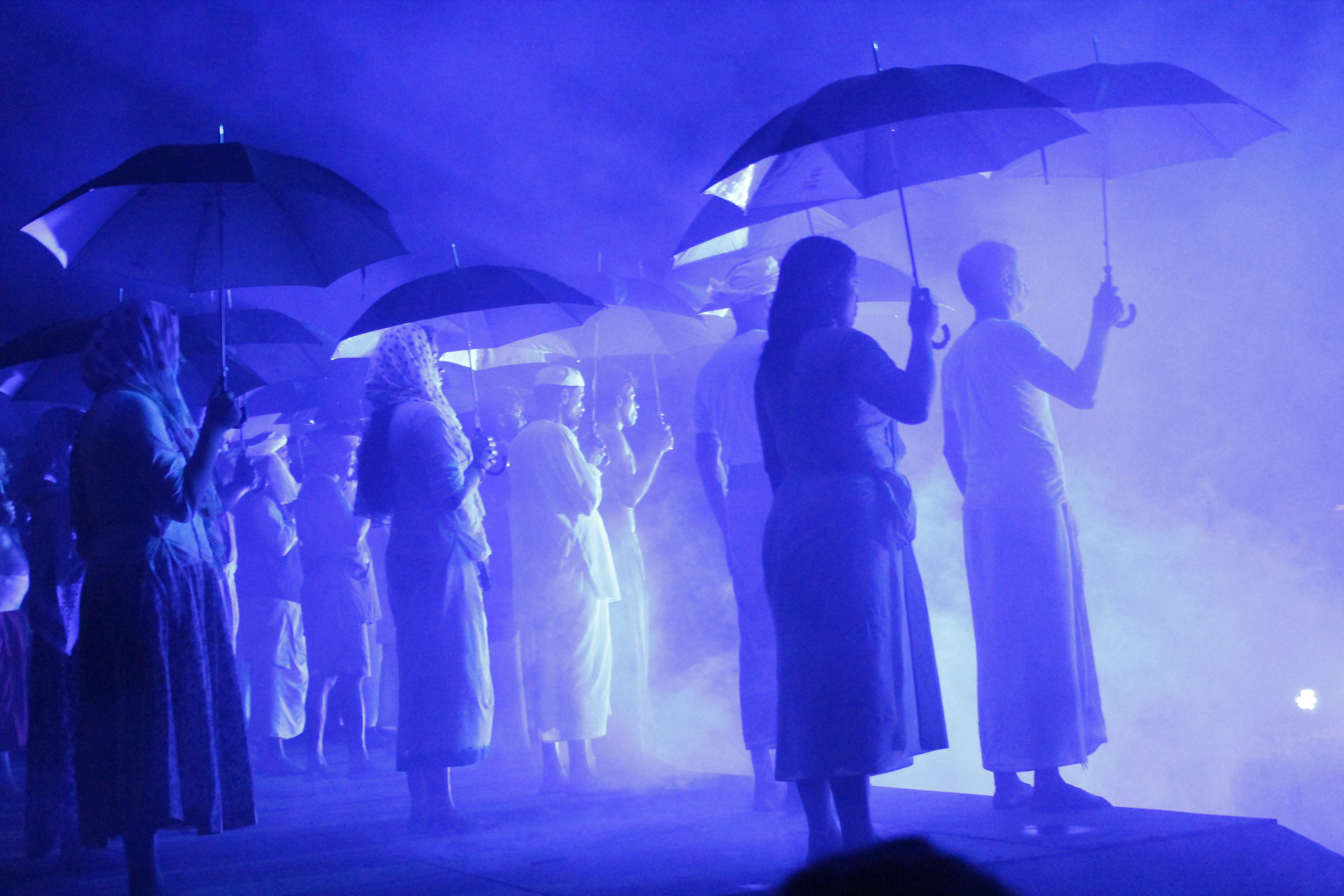 ഖസാക്കിന്റെ ഇതിഹാസം നാടകത്തില്‍ നിന്ന്.